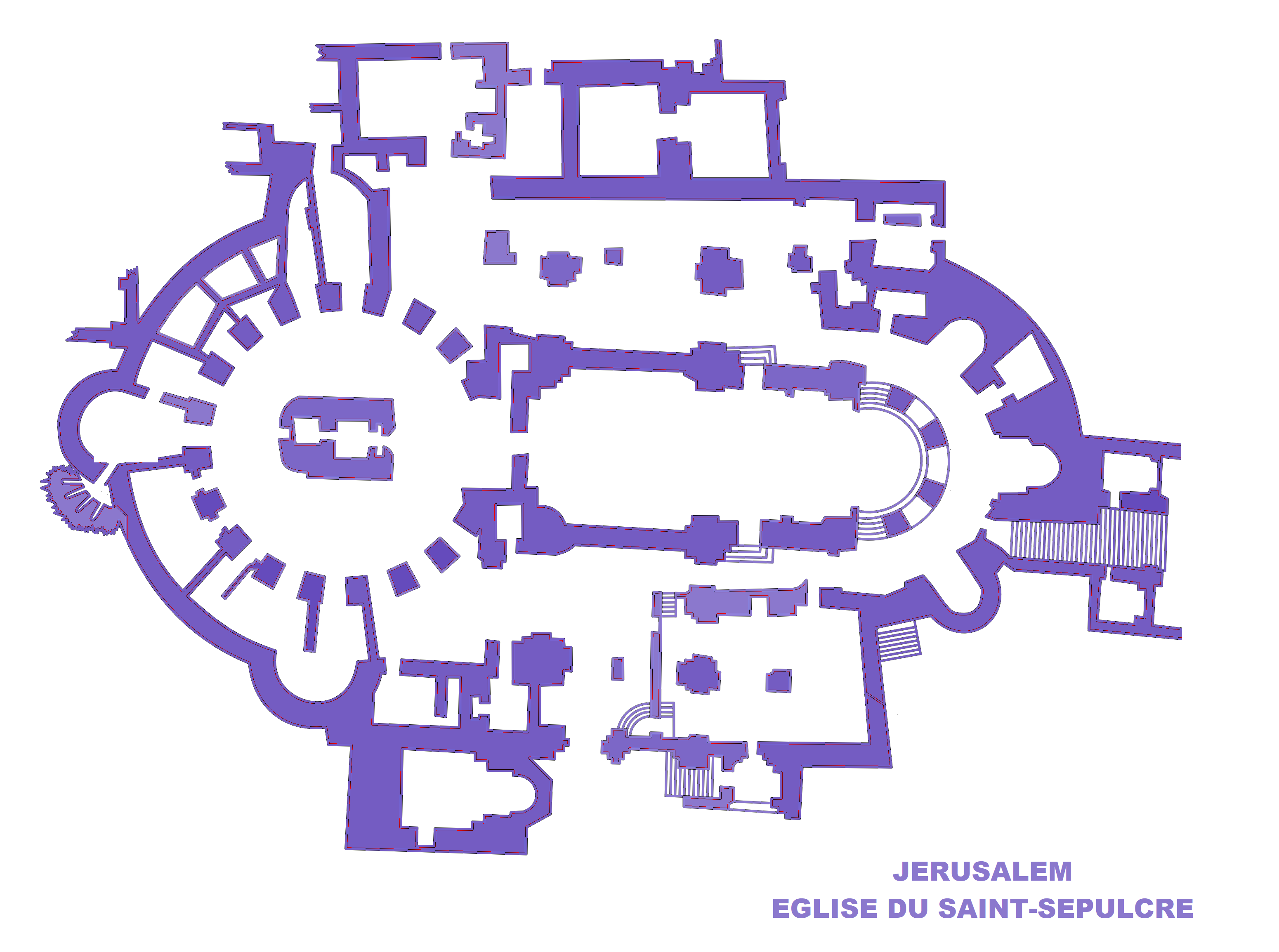 Jérusalem, Le Saint-Sépulcre, plan (image Commons modifiée)